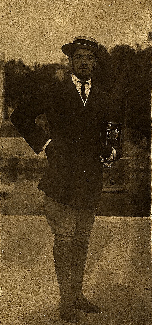 Amadeo de Souza Cardoso em Pont l'Abbé (Bretanha, França).